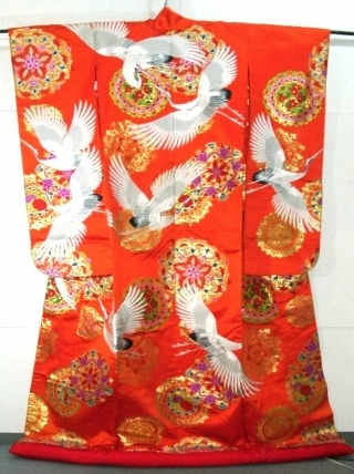 Uchikake